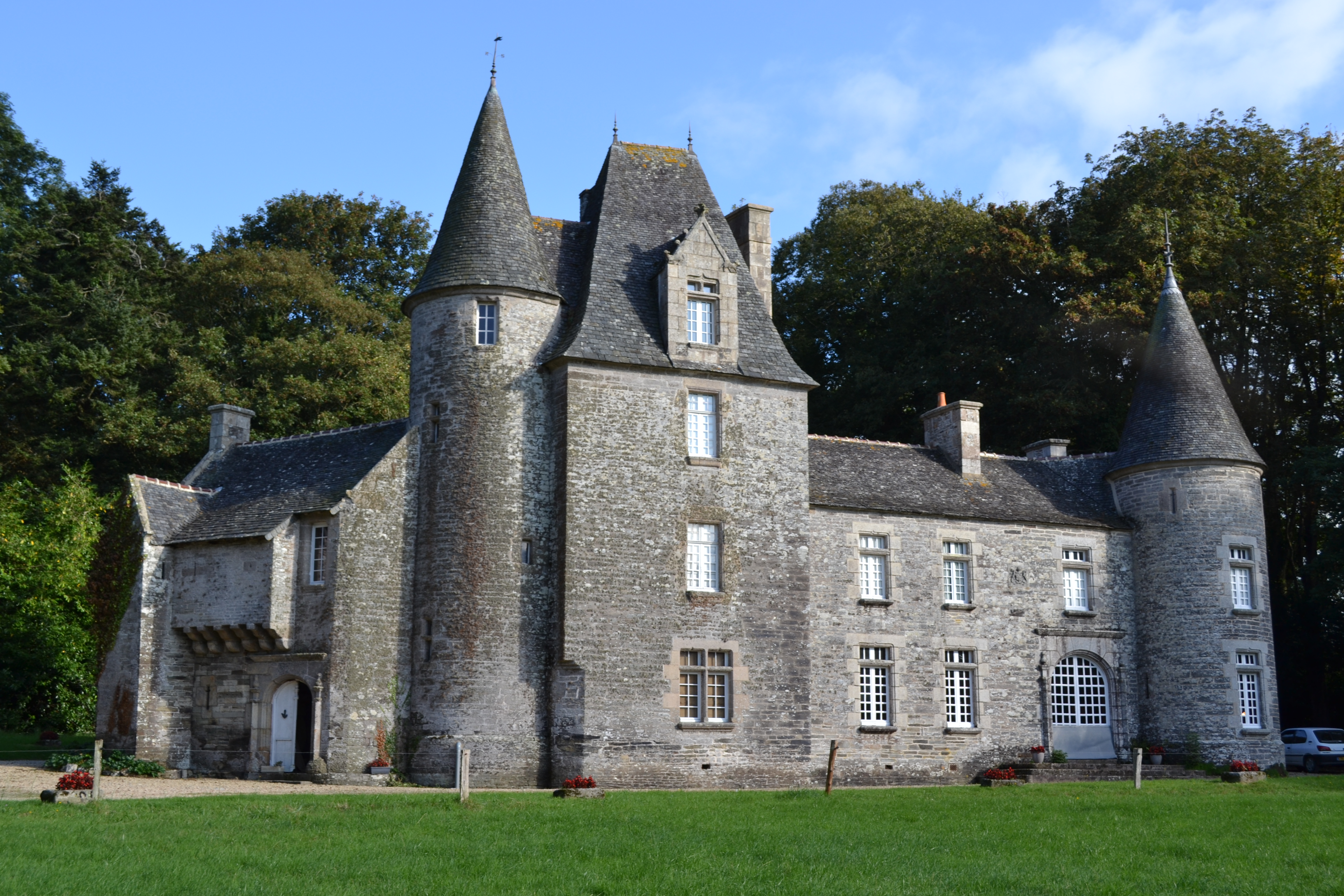 Château de Kervezec : manoir privé datant de 1568 situé à Garlan (Finistère, Bretagne).